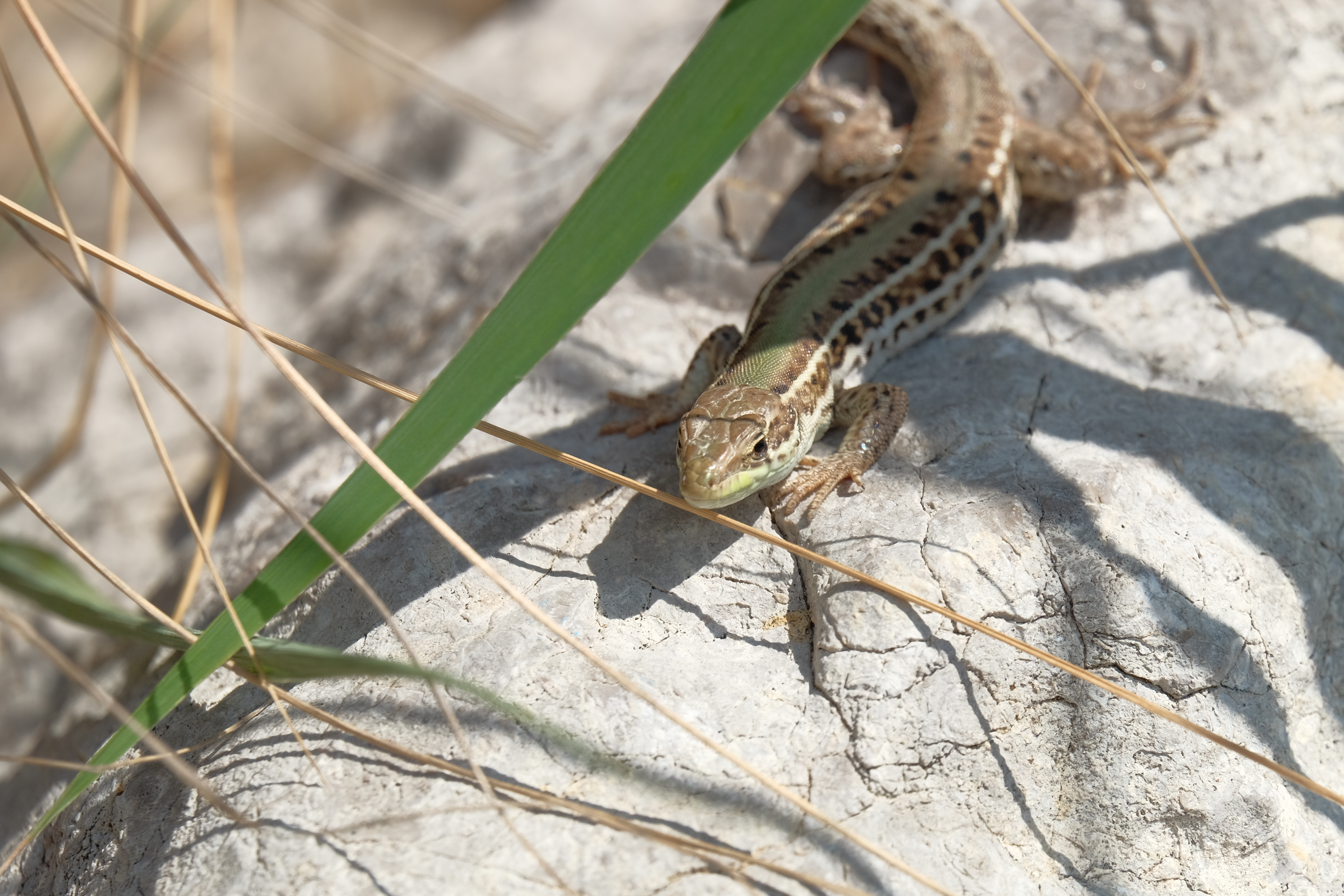 Podarcis tauricus from Crimea